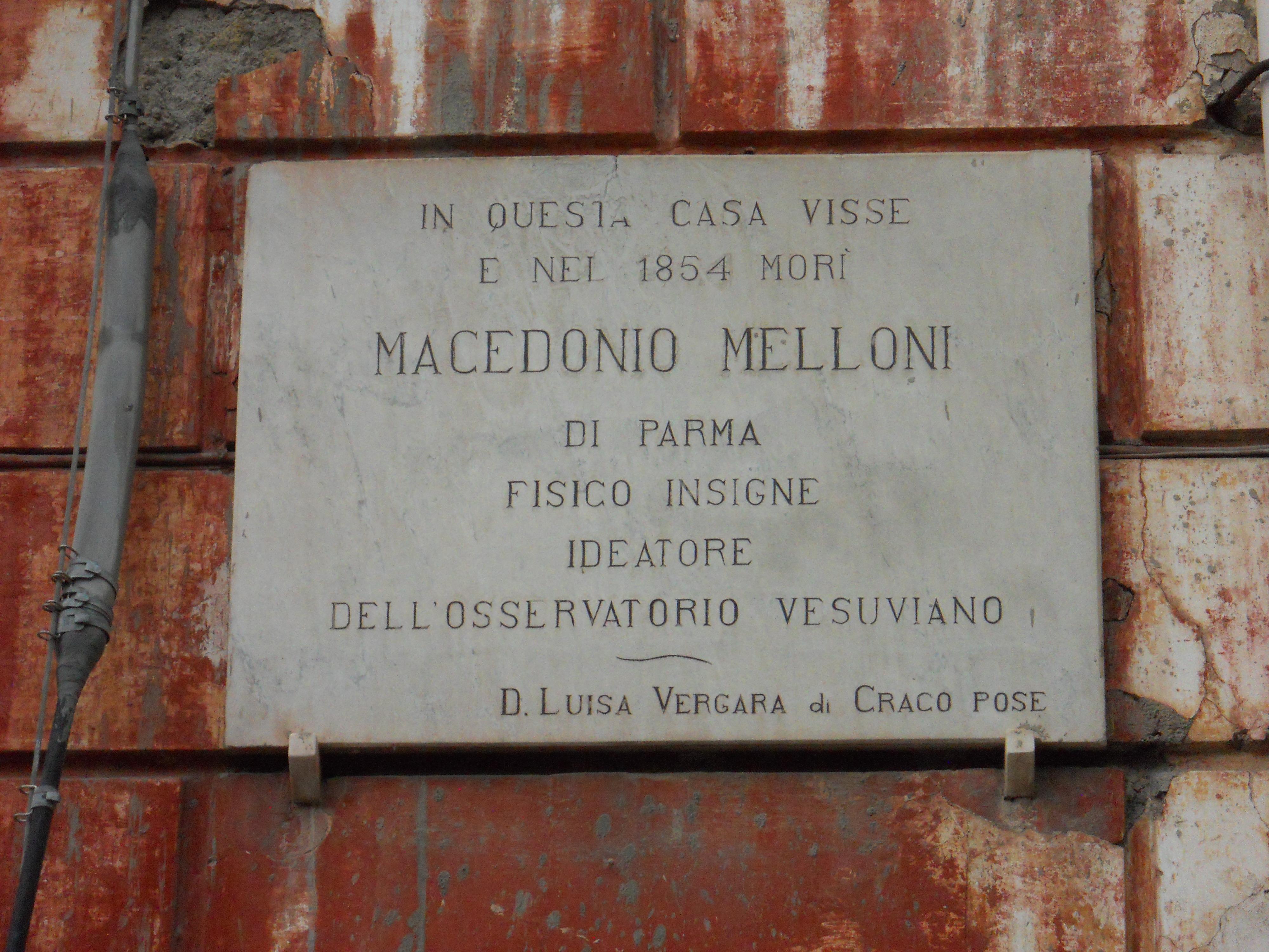 Macedonio Melloni - lapide commemorativa sulla facciata della sua casa di Portici